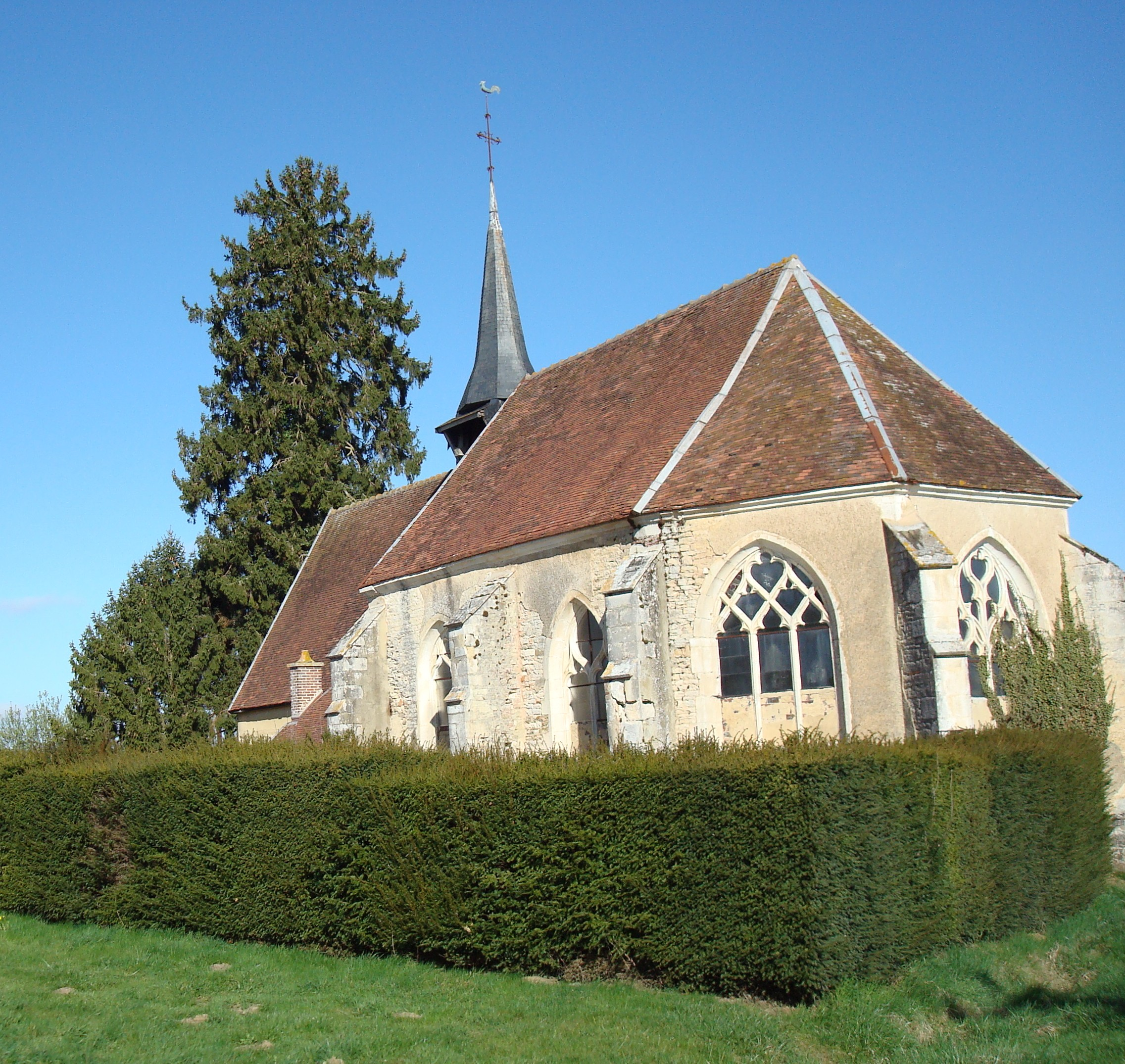 Eglise de Metz-Robert (Aube)